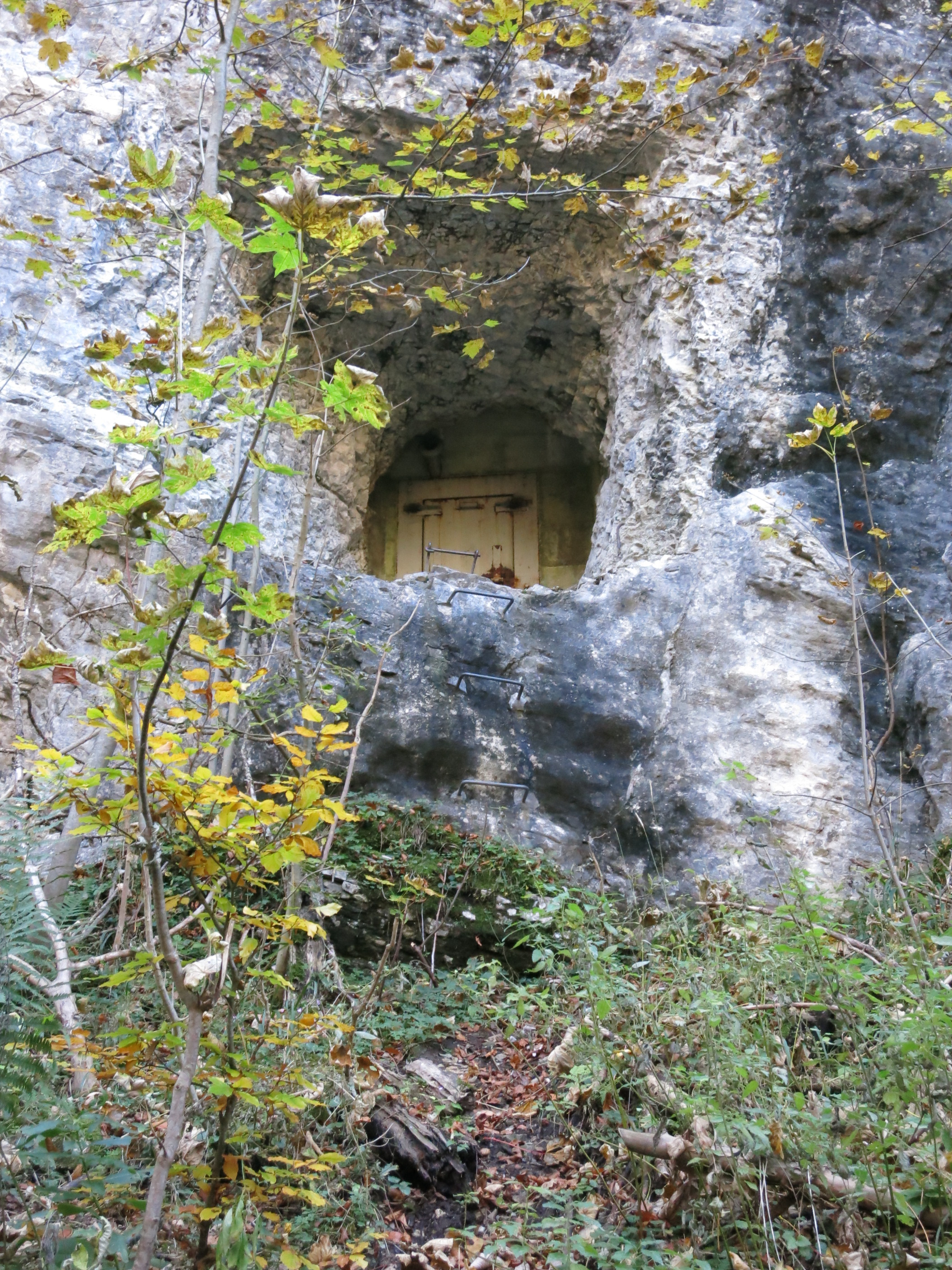 Burgruine Wildenburg, Wildhaus SG, Schweiz